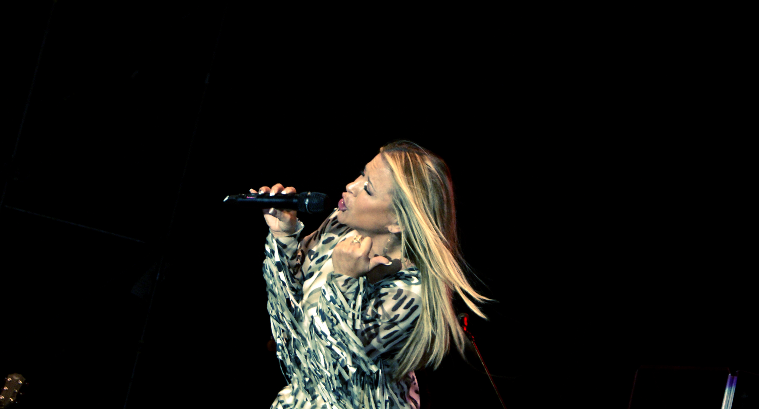 Anastacia durante il suo concerto in Italia il 12 Luglio 2012 (Villa Manin - Udine)